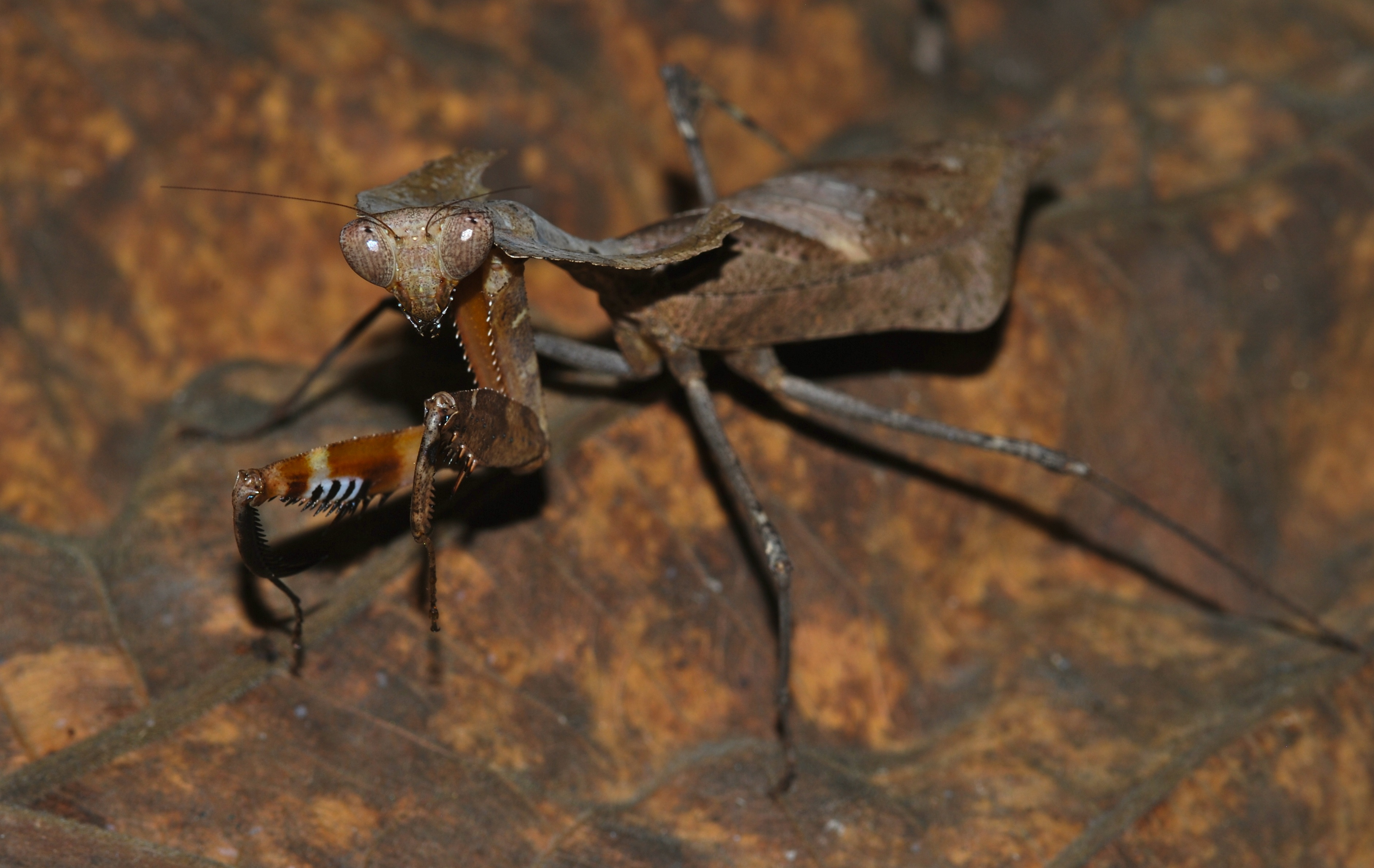 Taman Negara NP, Pahang, MALAYSIA